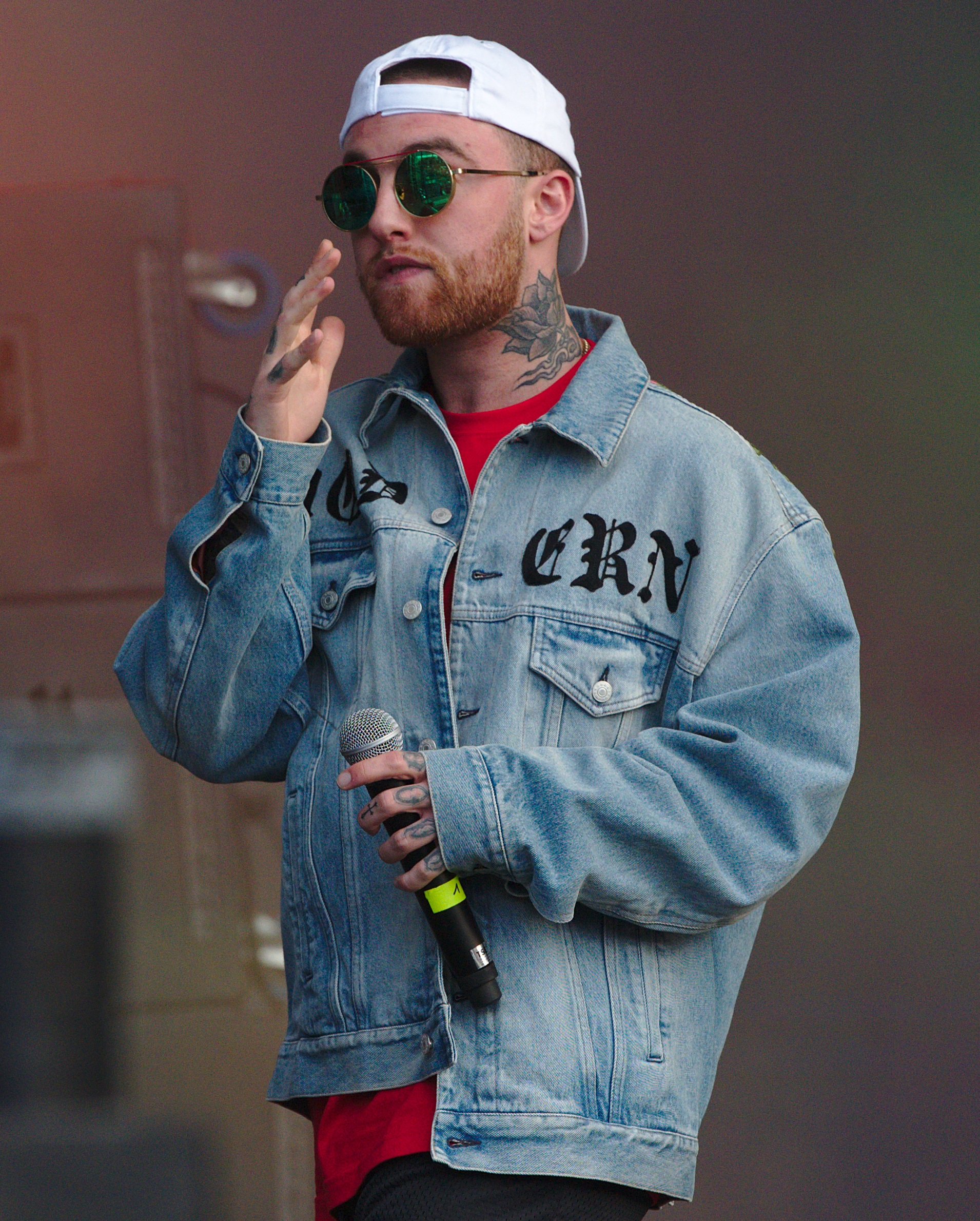 Der US-amerikanische Rapper Mac Miller beim splash! Festival 20 (2017).